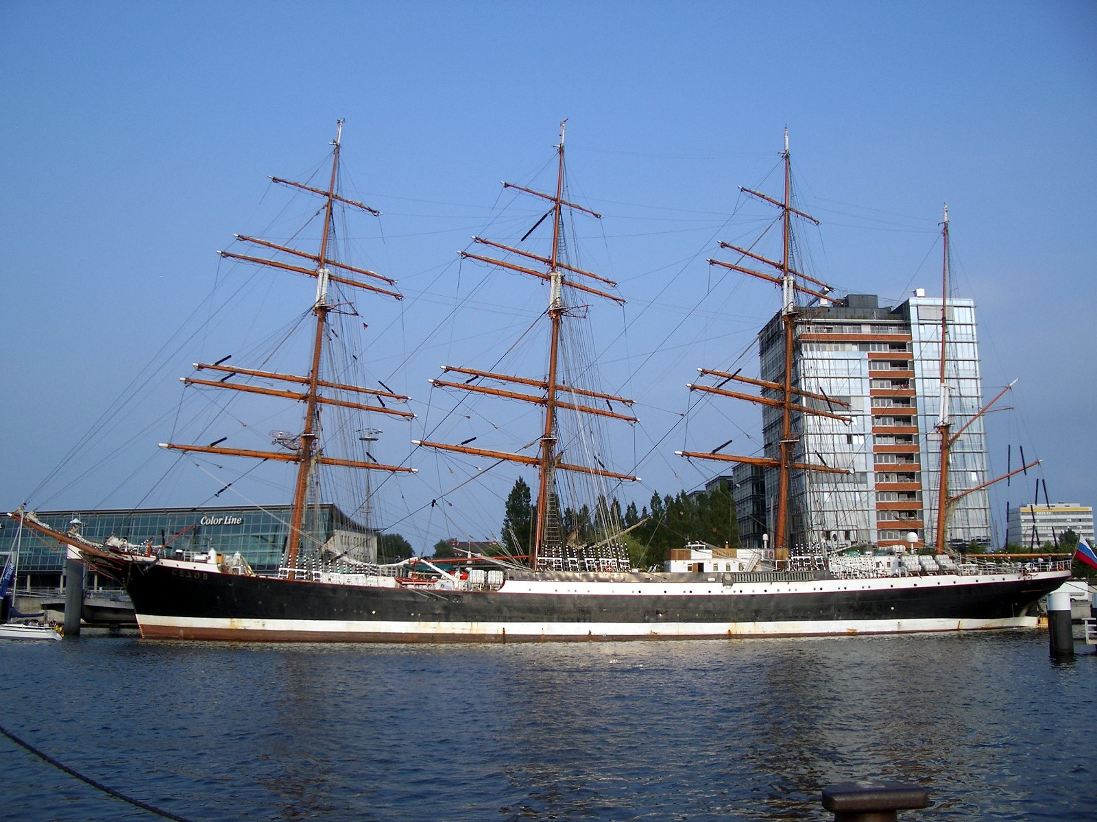 Segelschulschiff (Viermastbark) Sedow auf der Kieler Woche 2007. Der Rumpf ist noch in den Farben der Pamir gestrichen (für die Filmaufnahmen zum Fernsehfilm "Der Untergang der Pamir").